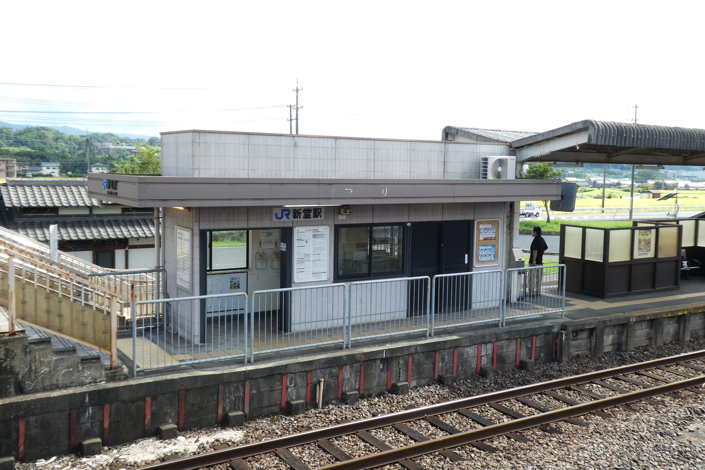 JR関西本線新堂駅。ホーム上の簡易駅舎